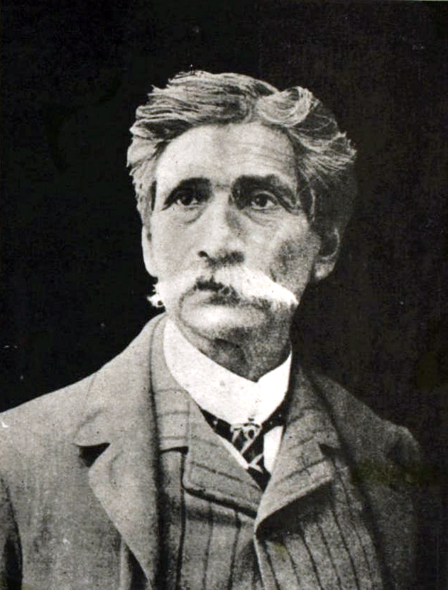 Nicanor Plaza, escultor y profesor de arte chileno, nació en Santiago de Chile en 1844 y falleció en Florencia, Italia, el 7 de diciembre de 1918. Autor de obras inspiradas en la historia.